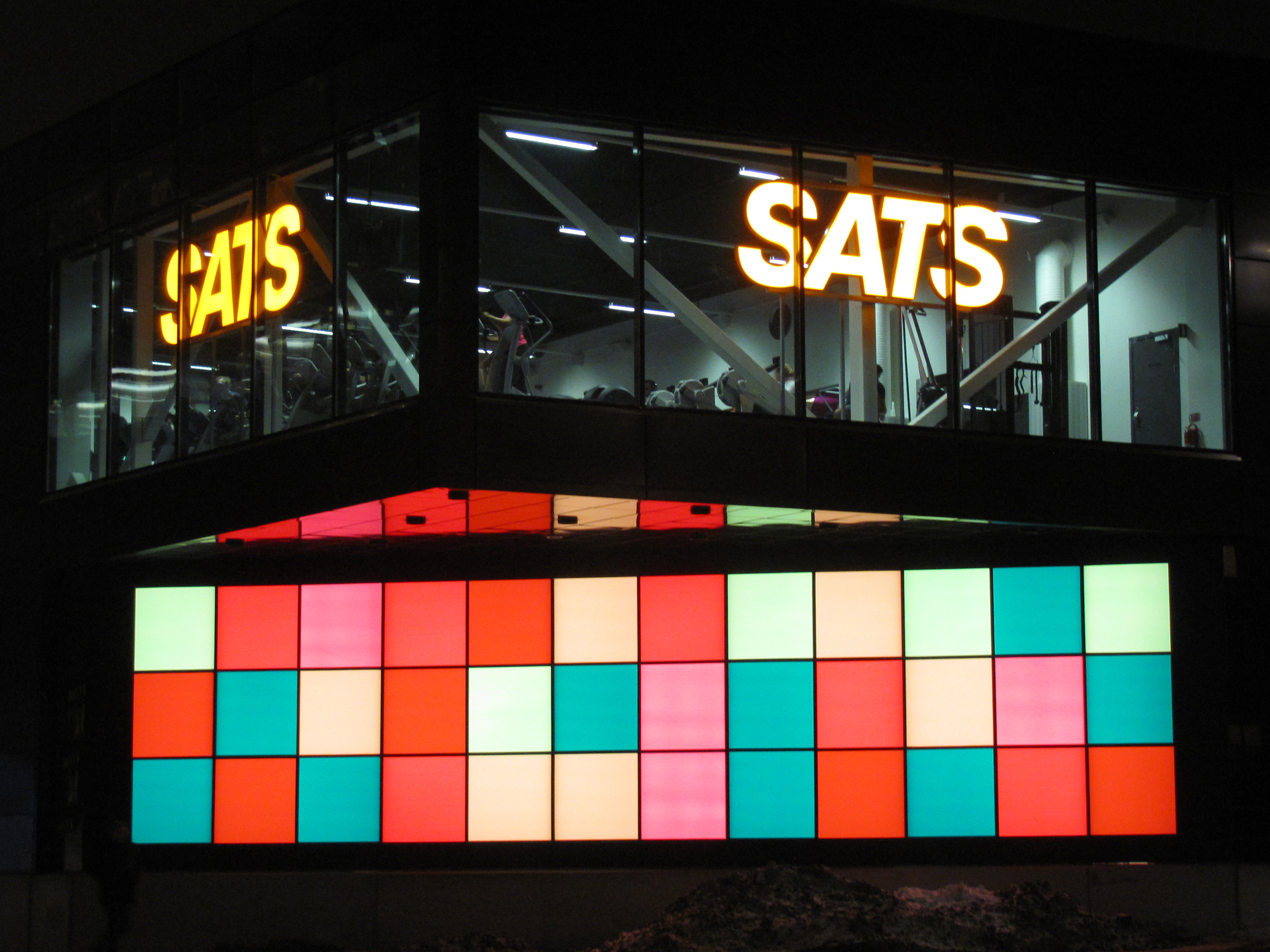 Sats träningslokal i Kista centrum